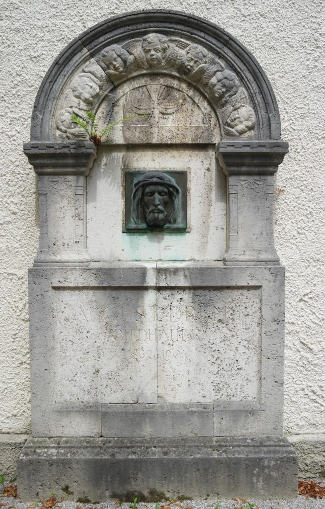 Grabplatte von Bildhauer August Drumm, 1862-1904, am Friedhofsgebäude des Alten Friedhofs München-Solln, Friedhofweg 1